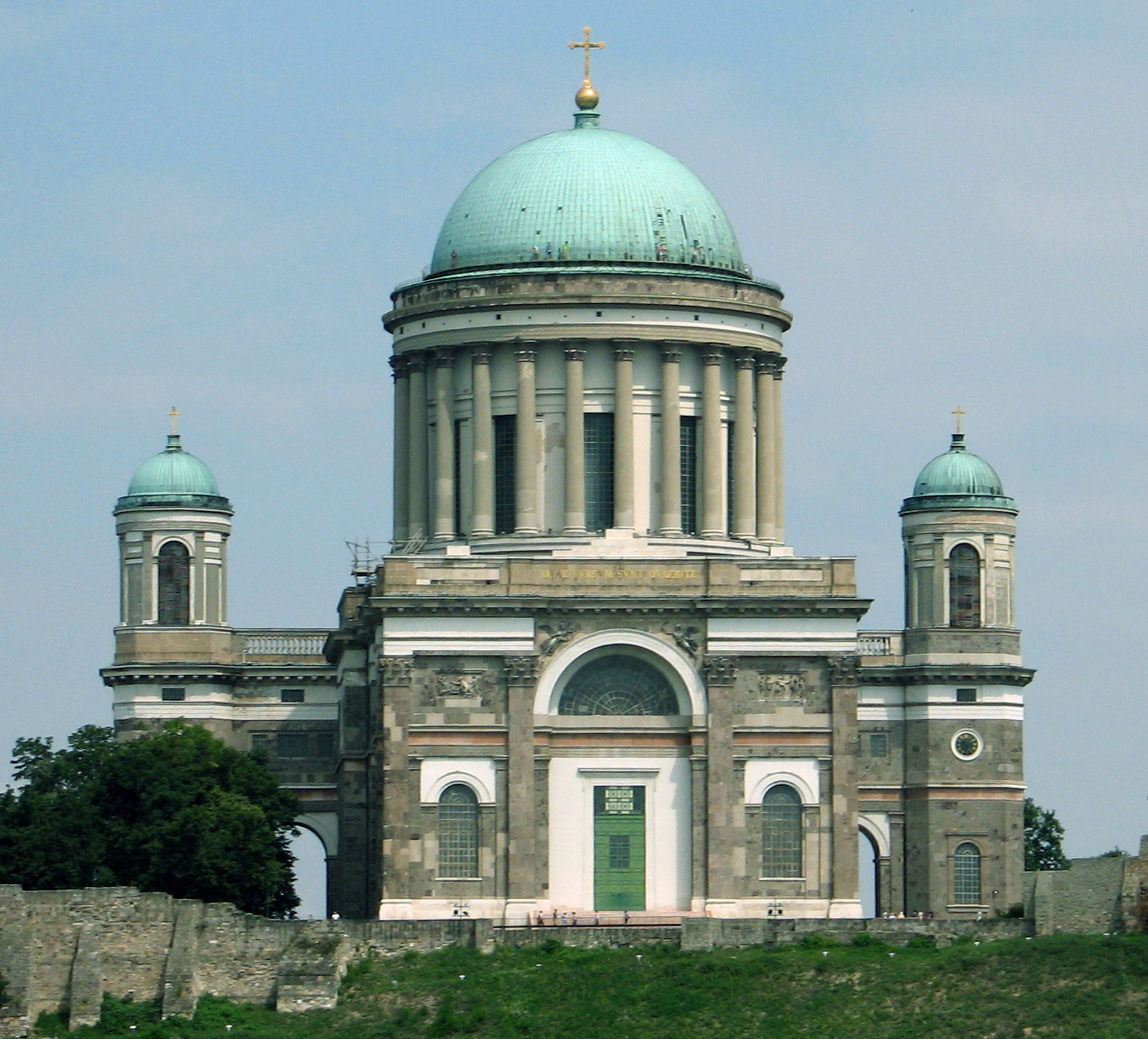 SiSwati: Pohľad na baziliku zo štúrovského brehu